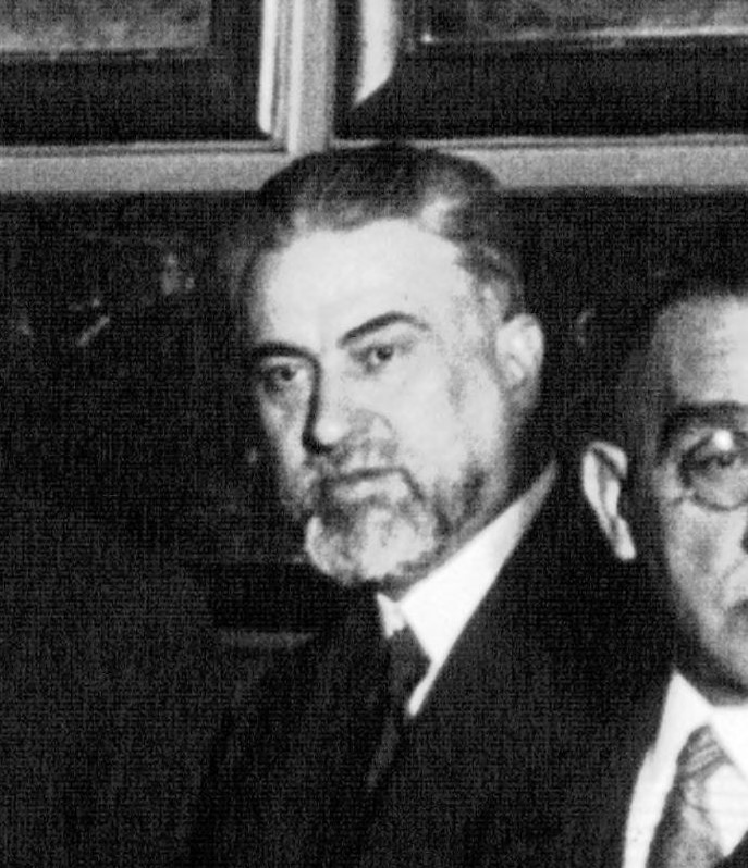 Vista de Édouard Herriot a España en 1932.